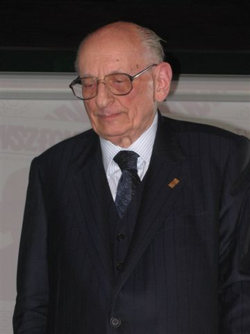 Władysław Bartoszewski (Warsaw, 19.02.1922, - Warsaw, 24.4.2015), Polish historian, publicist, writer and diplomat